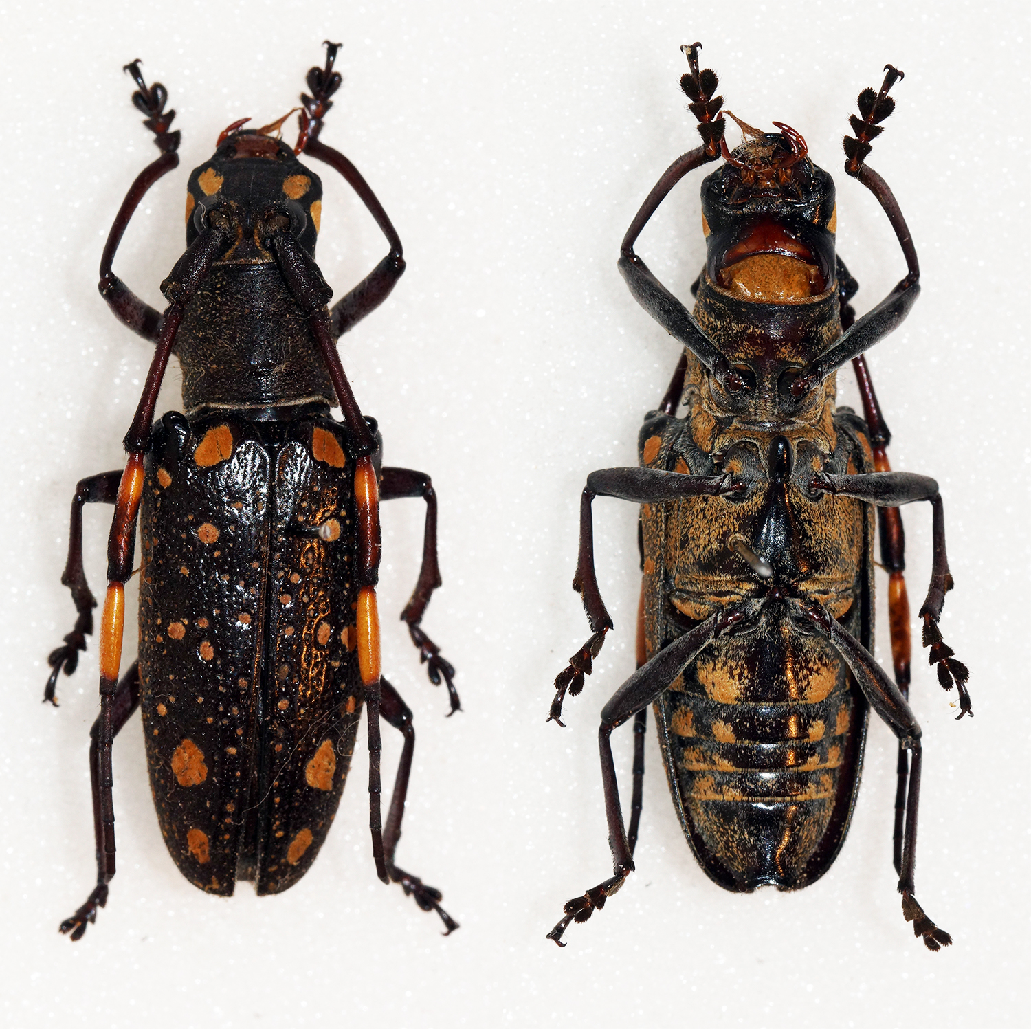 Ritsema, 1888 Sex: Female Data: 06-2014 - Mt Bawang - 1400m - West Kalimantan - Borneo Size: 31mm